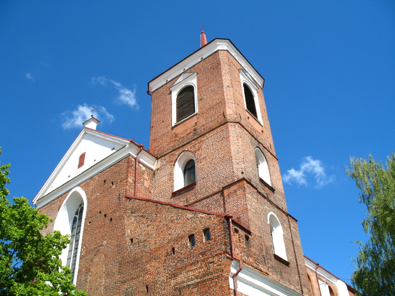 Šv. apaštalų Petro ir Povilo arkikatedros bazilikos bokštas, Kaunas.